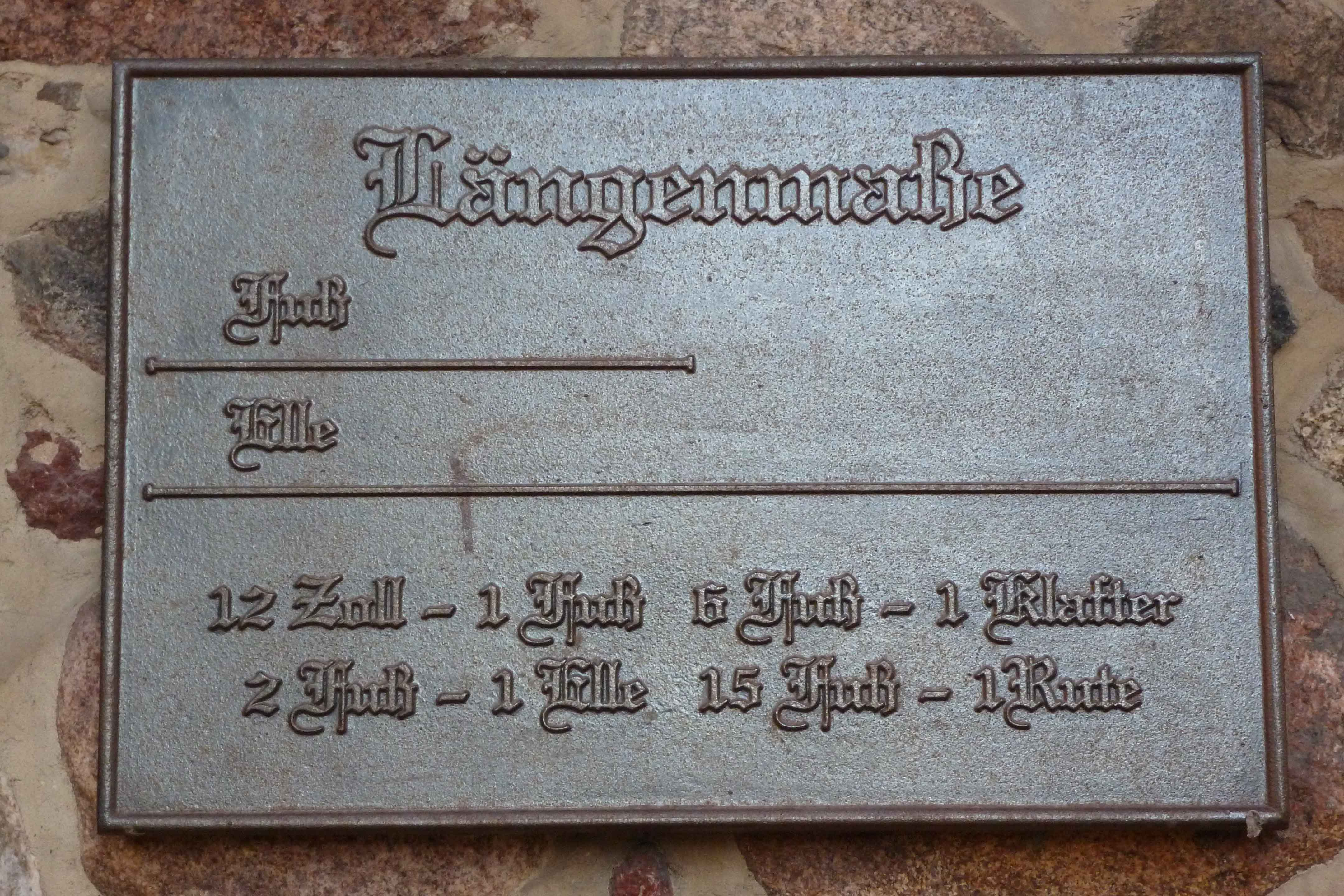 Alte Maßeinheiten